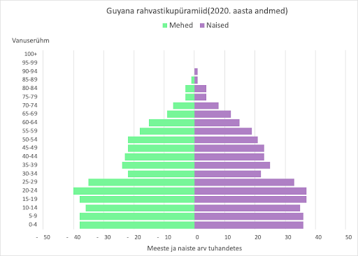 Guyana rahvastikupüramiid(2020 aasta andmed)